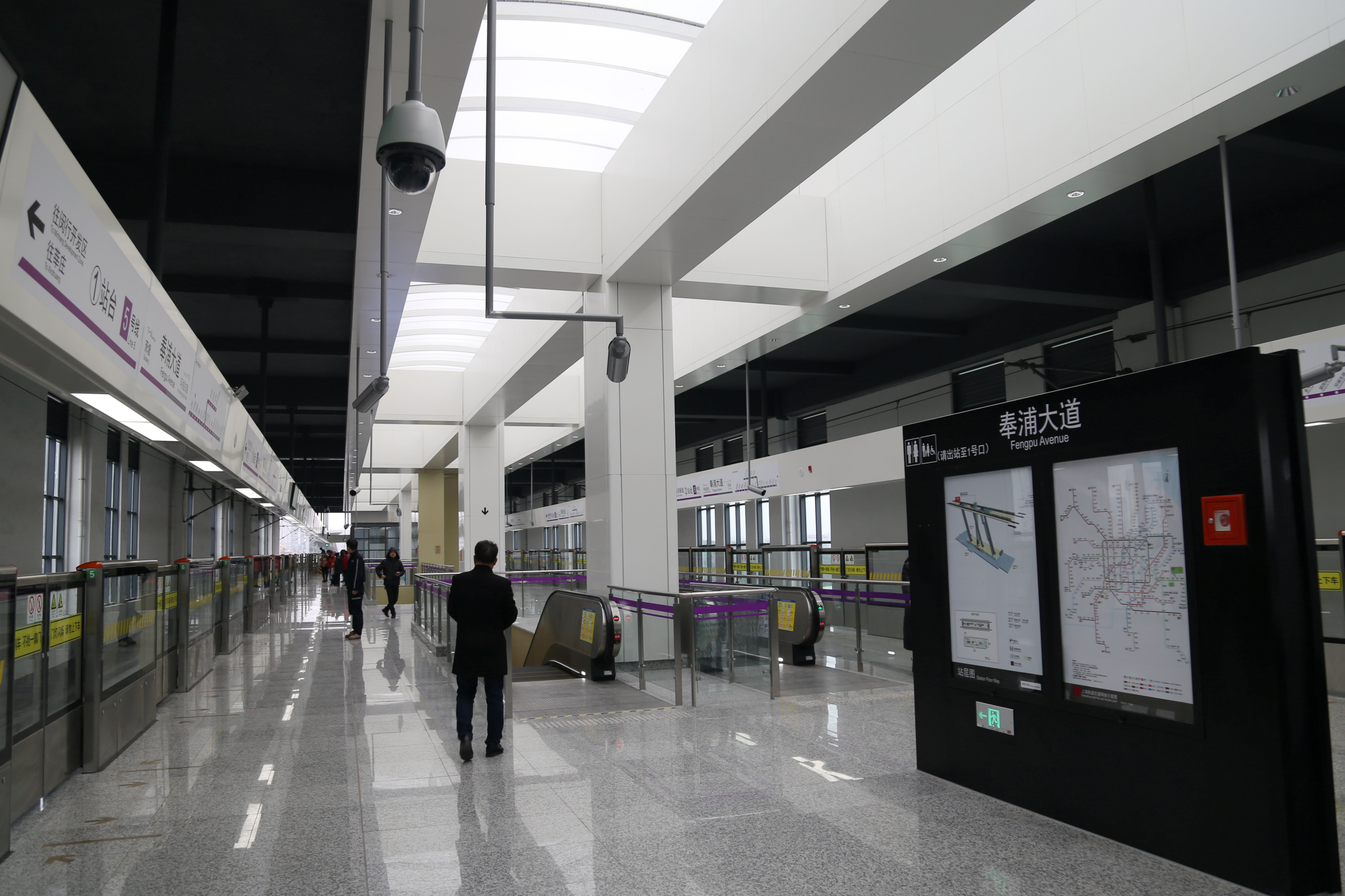 奉浦大道站站台